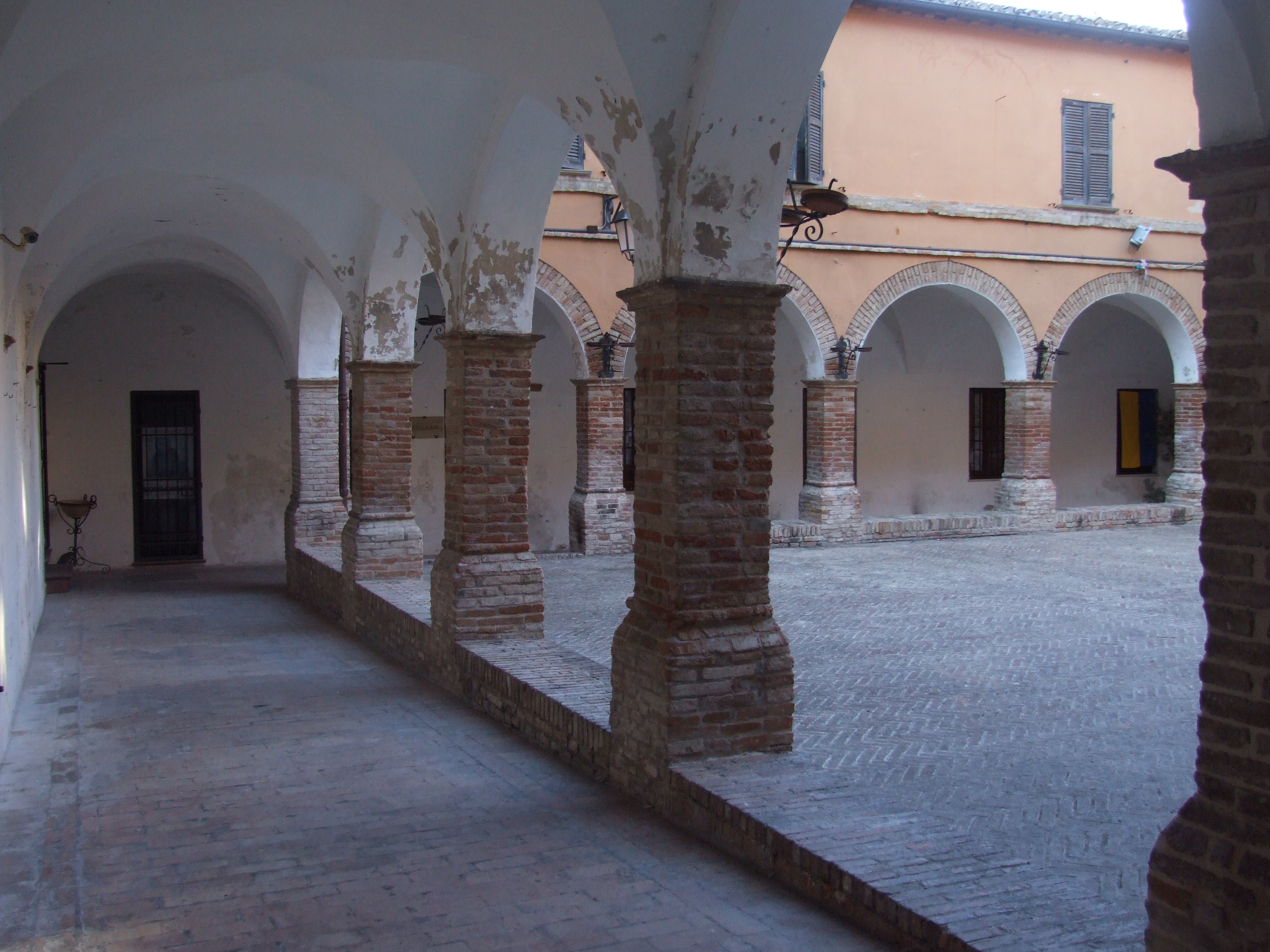 Chiostro dell'ex Convento di San Francesco a Mondavio This is a photo of a monument which is part of cultural heritage of Italy.